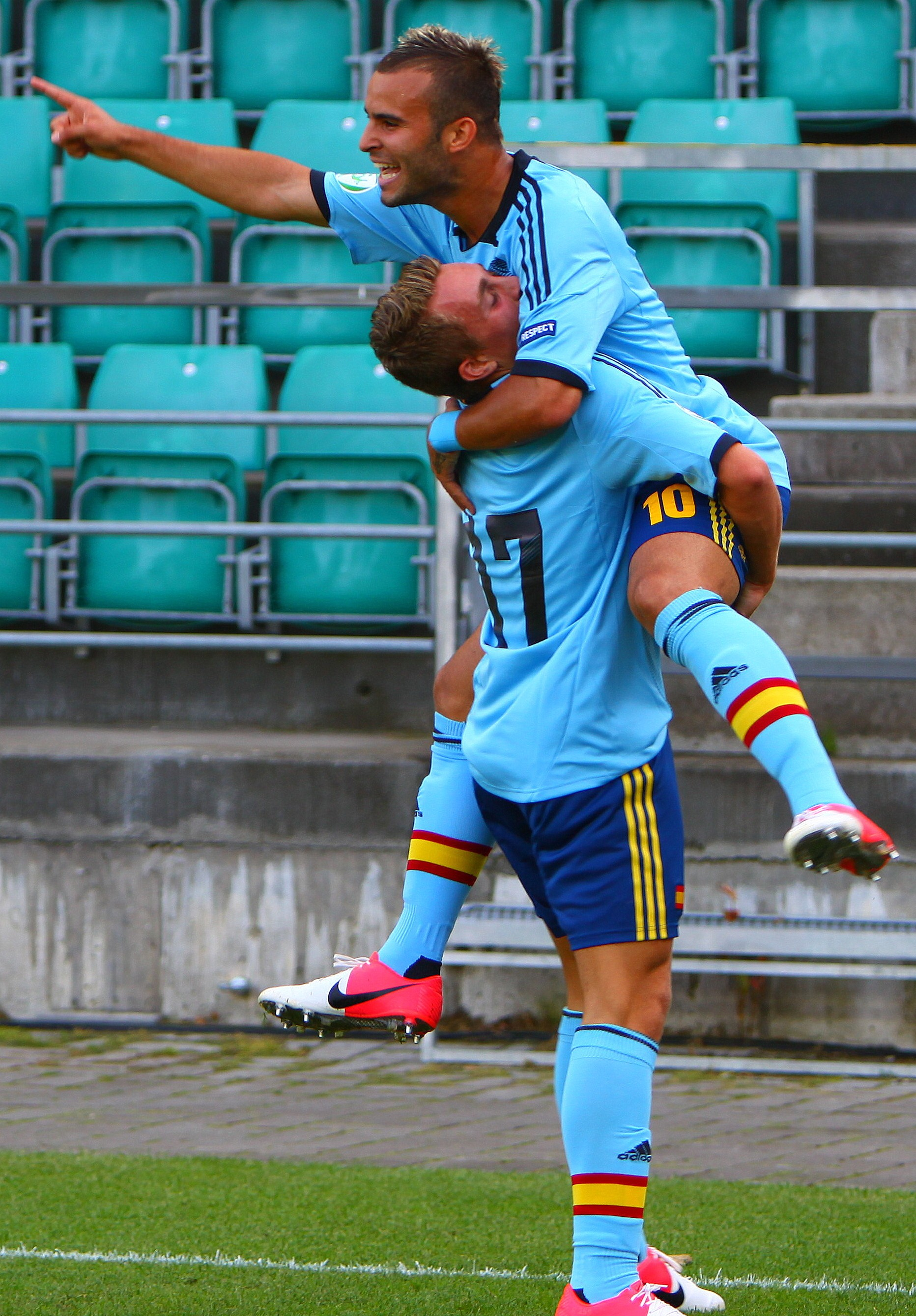 U-19 Portugal vs Spain.